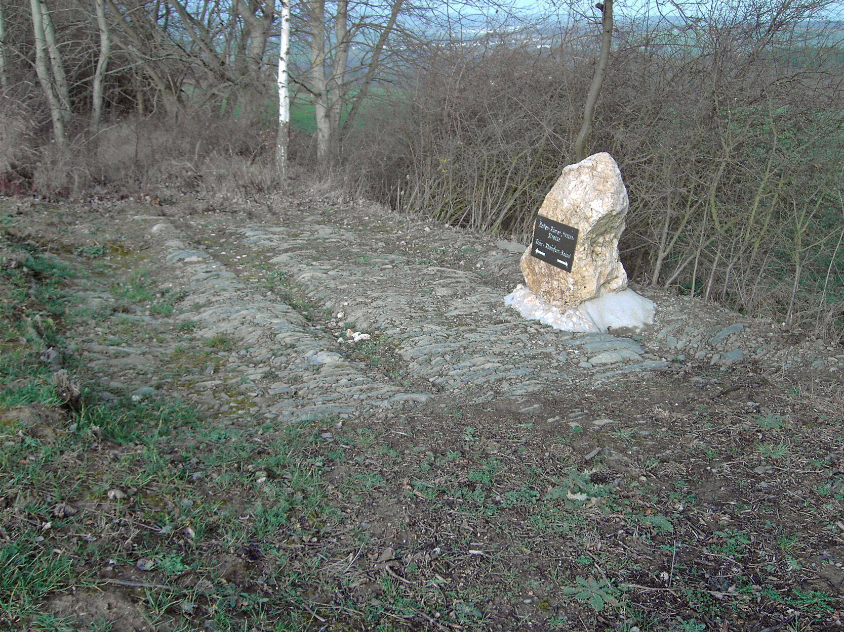 Bild der freigelegten Römerstraße/Hessenstraße in der Gemarkung Reichenberg